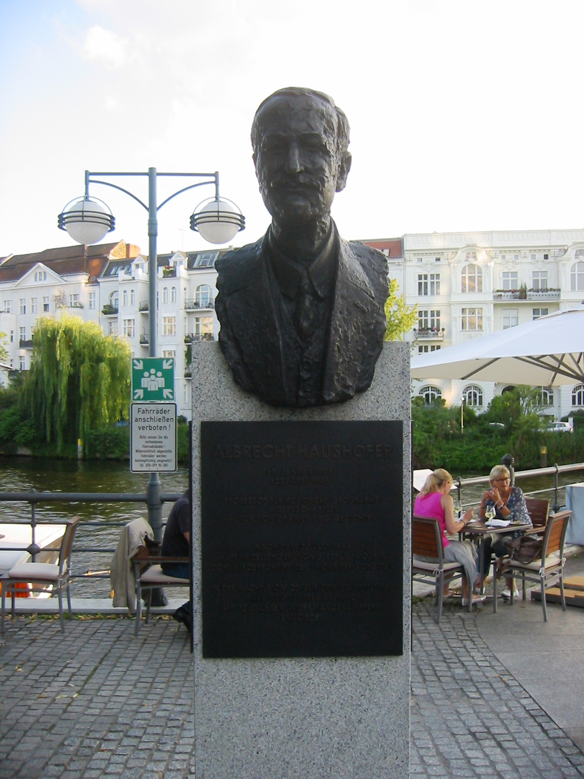 Büste für Albrecht Haushofer in der "Straße der Erinnerung", einem öffentlich zugänglichen Denkmal im Spreebogen im Berliner Ortsteil Moabit. Mit den Skulpturen ehrt die Ernst Freiberger-Stiftung Persönlichkeiten, die vorrangig in der ersten Hälfte des 20. Jahrhunderts "außergewöhnliches geleistet und in schwierigsten Zeiten vorbildliche Haltung bewiesen haben“.